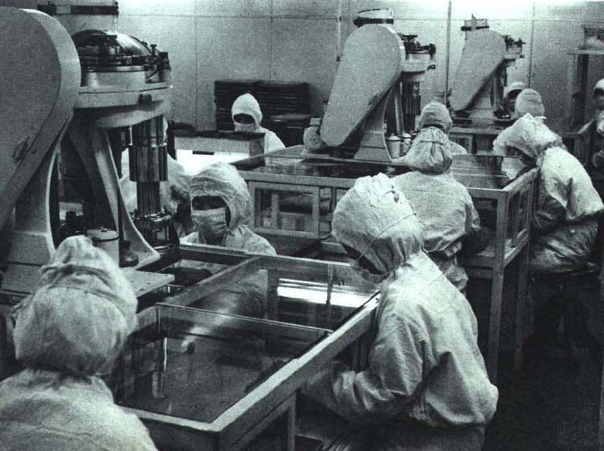 1964-04 1964年 无菌车间制作青霉素